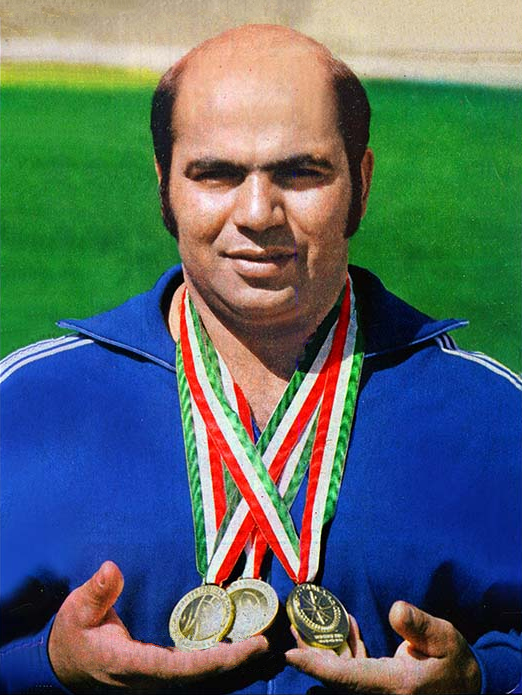 Houshang Kargarnejad, 1974 Asian Games in Tehran